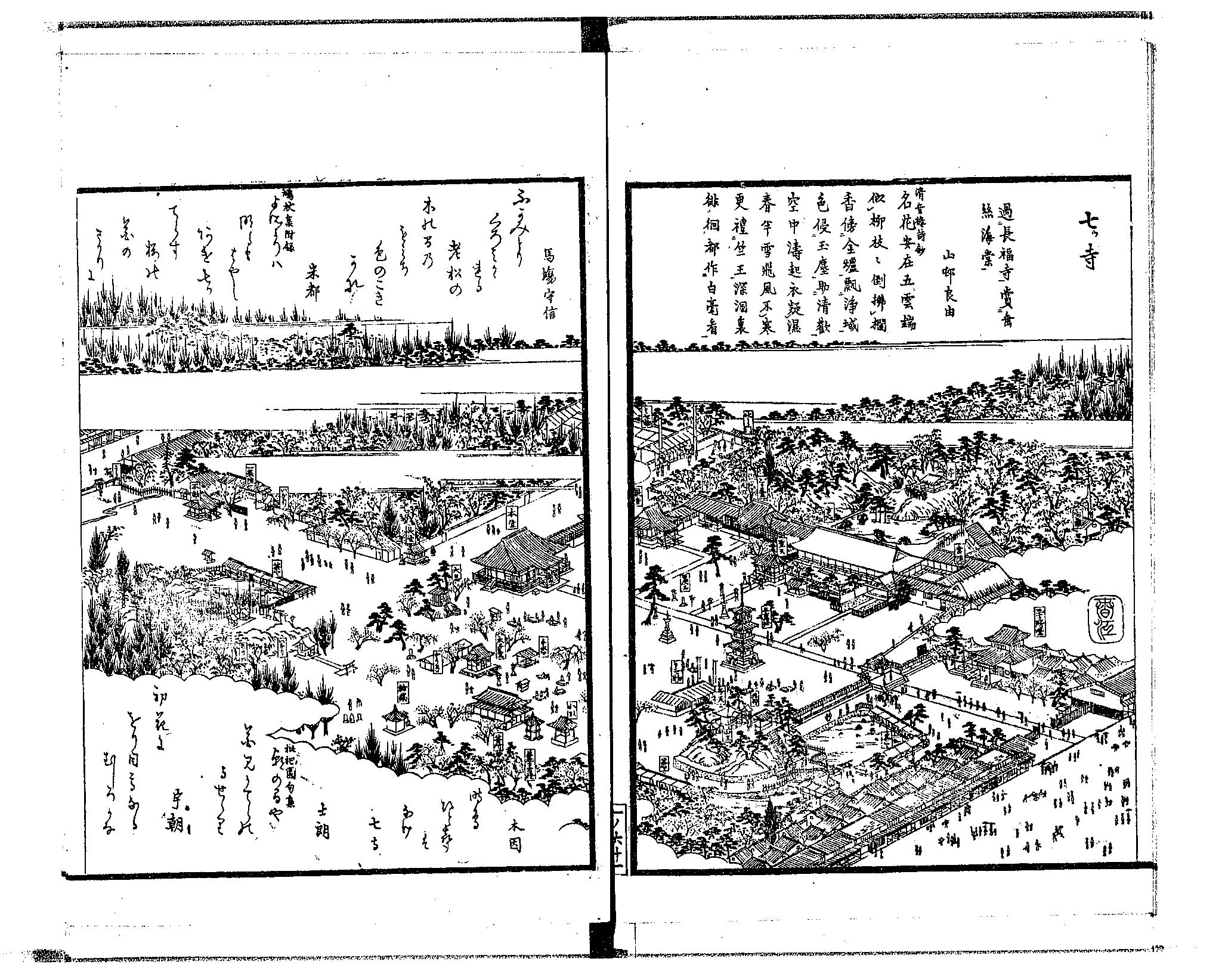 かつての七寺（『尾張名所図会. 前編 巻１ 愛智郡』より「七ツ寺」）